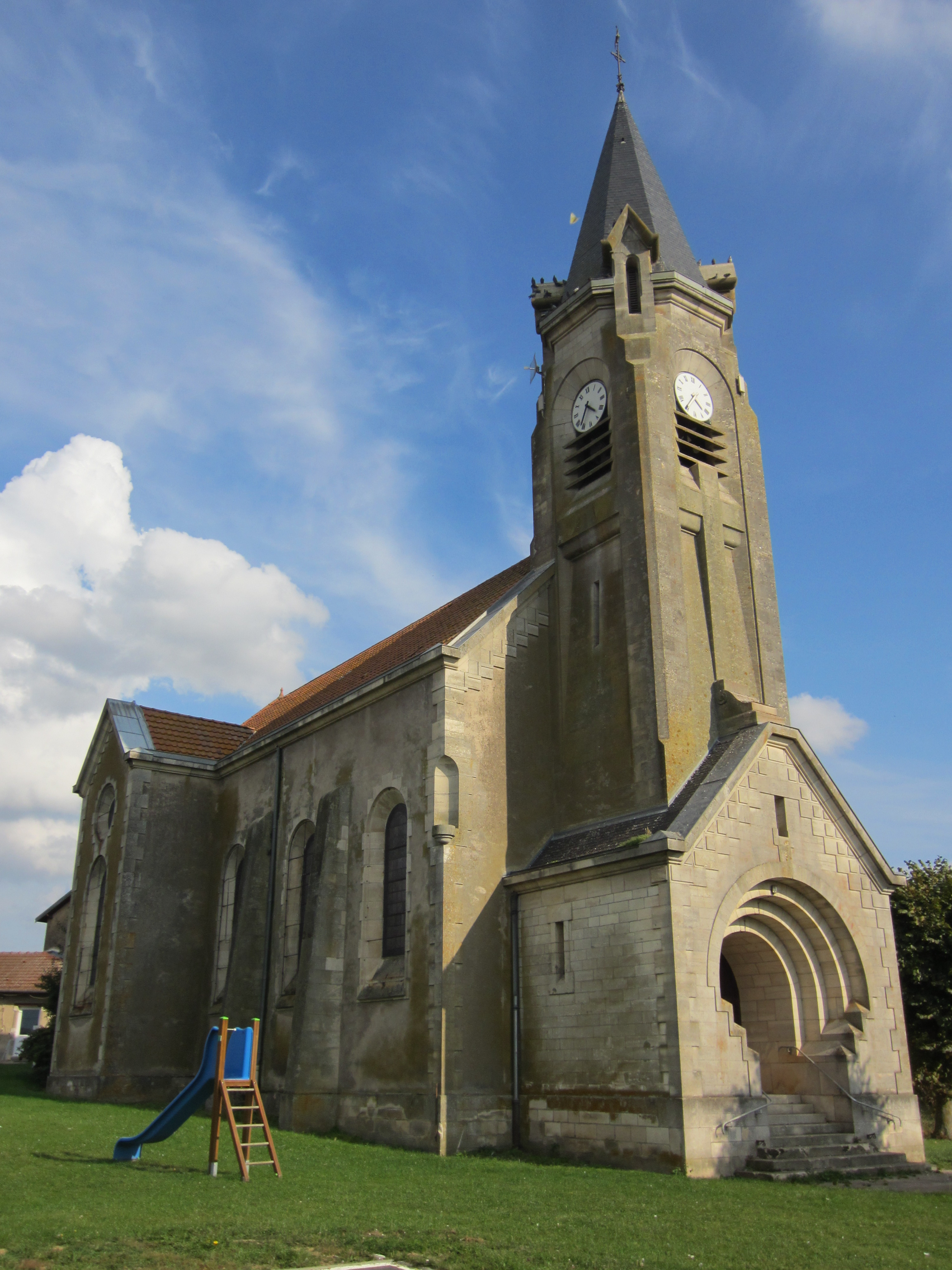 Description eglise st Baussant eglise st Baussant